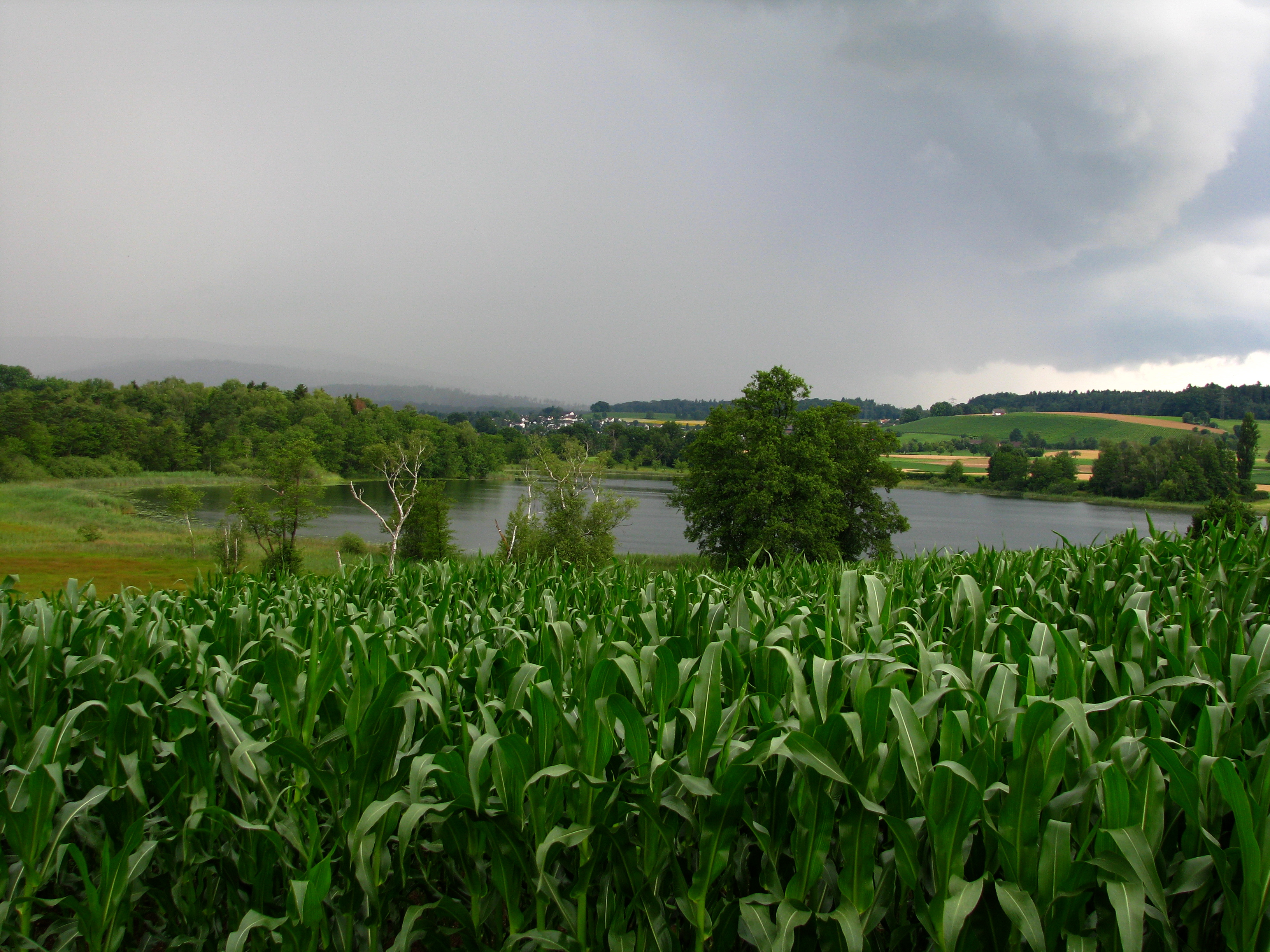 oberer (upper) Katzensee as seen from Zürich-Unteraffoltern, Regensdorf-Watt in the background